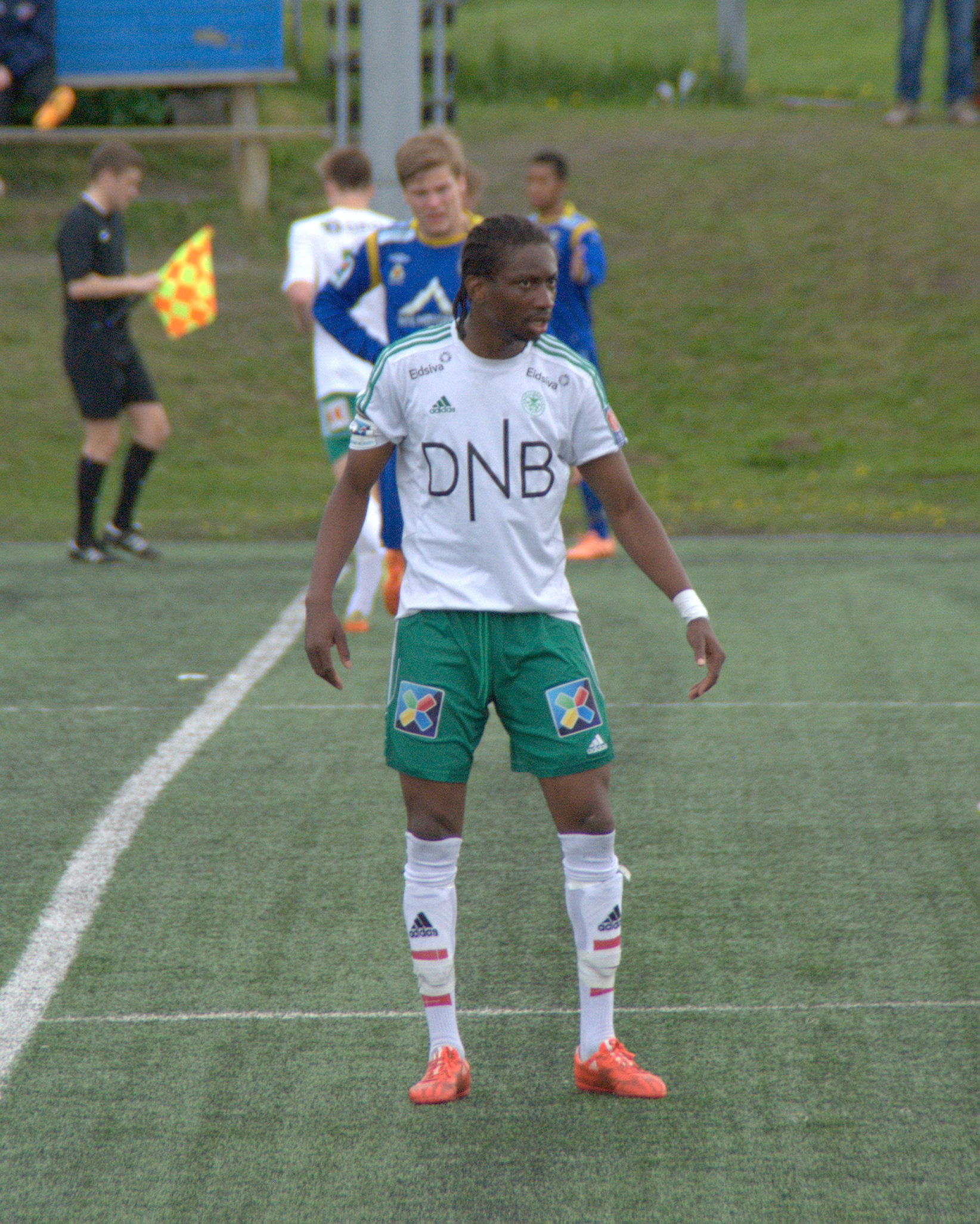 Osei Kwaku «Ozzy» Oviasu for Hamarkameratene